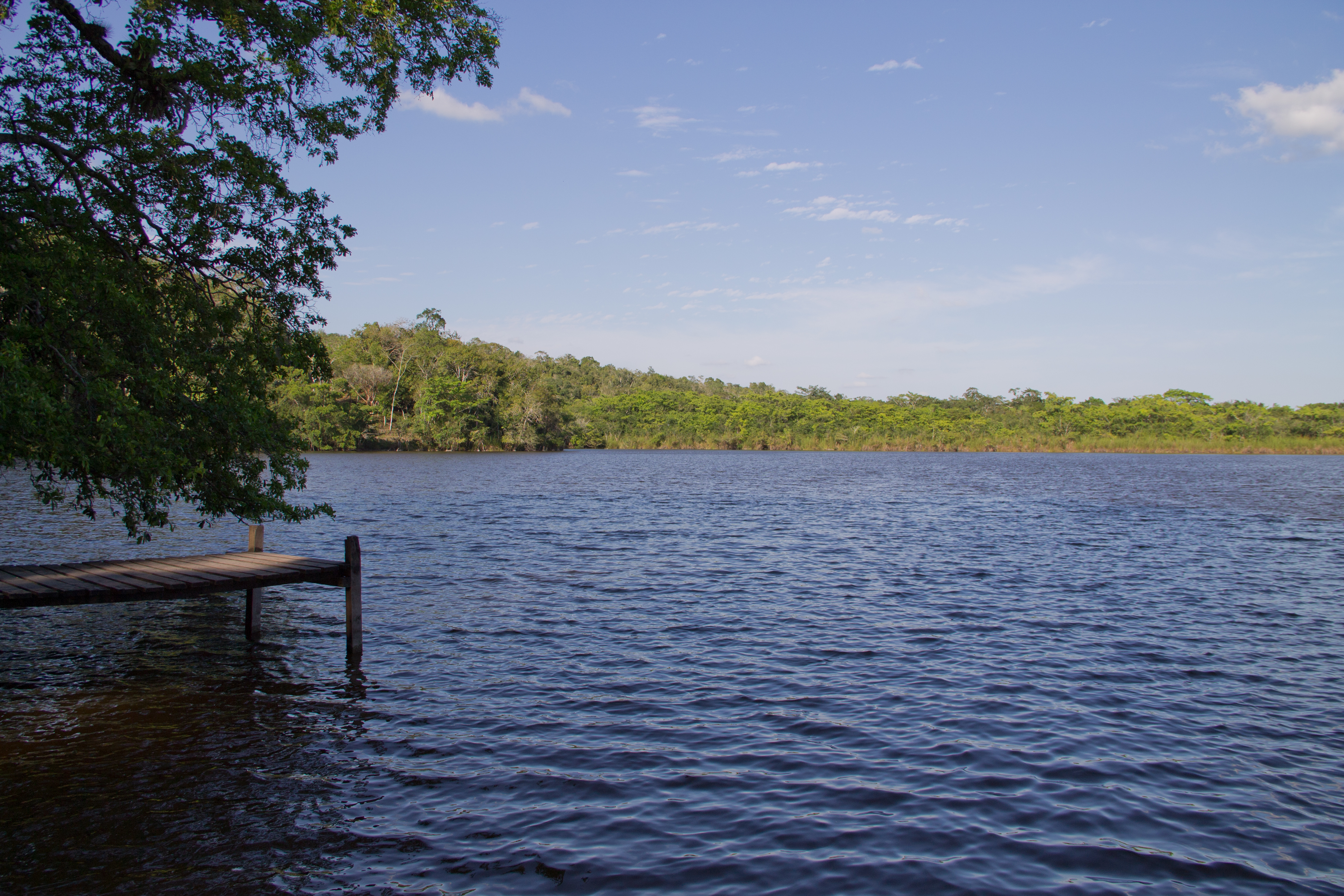 Aguacate Lagoon